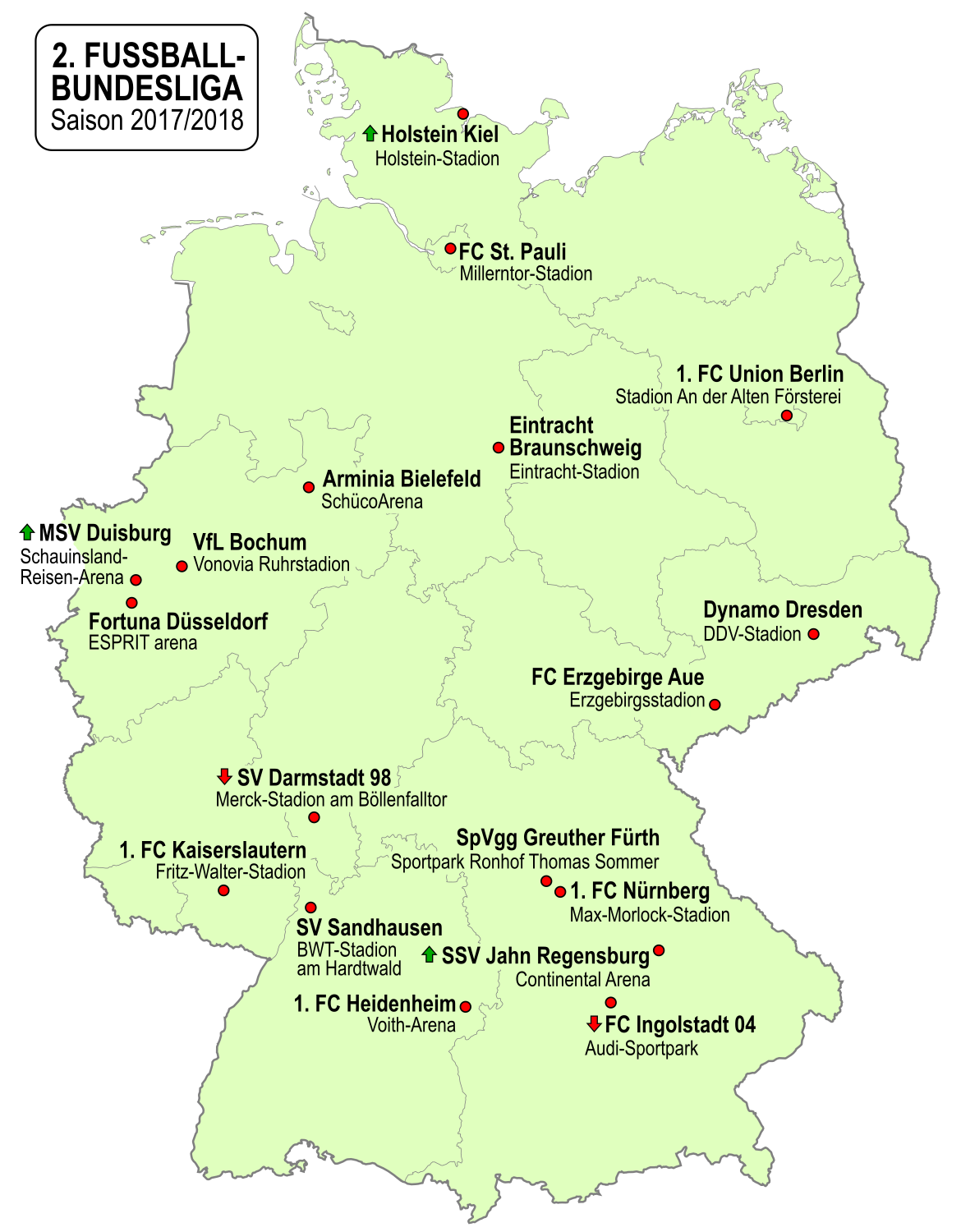 Karte der Vereine der 2. Fußball-Bundesliga-Saison 2017/2018